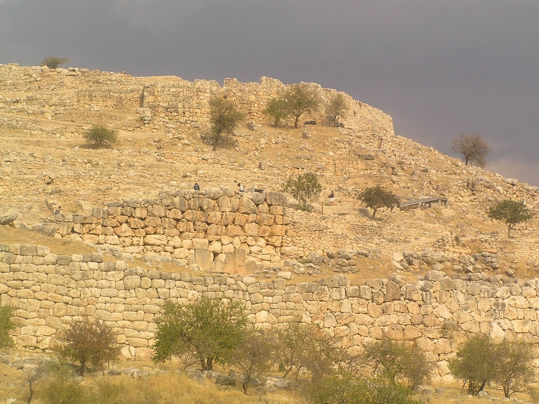 Зидине Микене. Ову сам фотографију направио током мог посета грчкој септембра 2005.